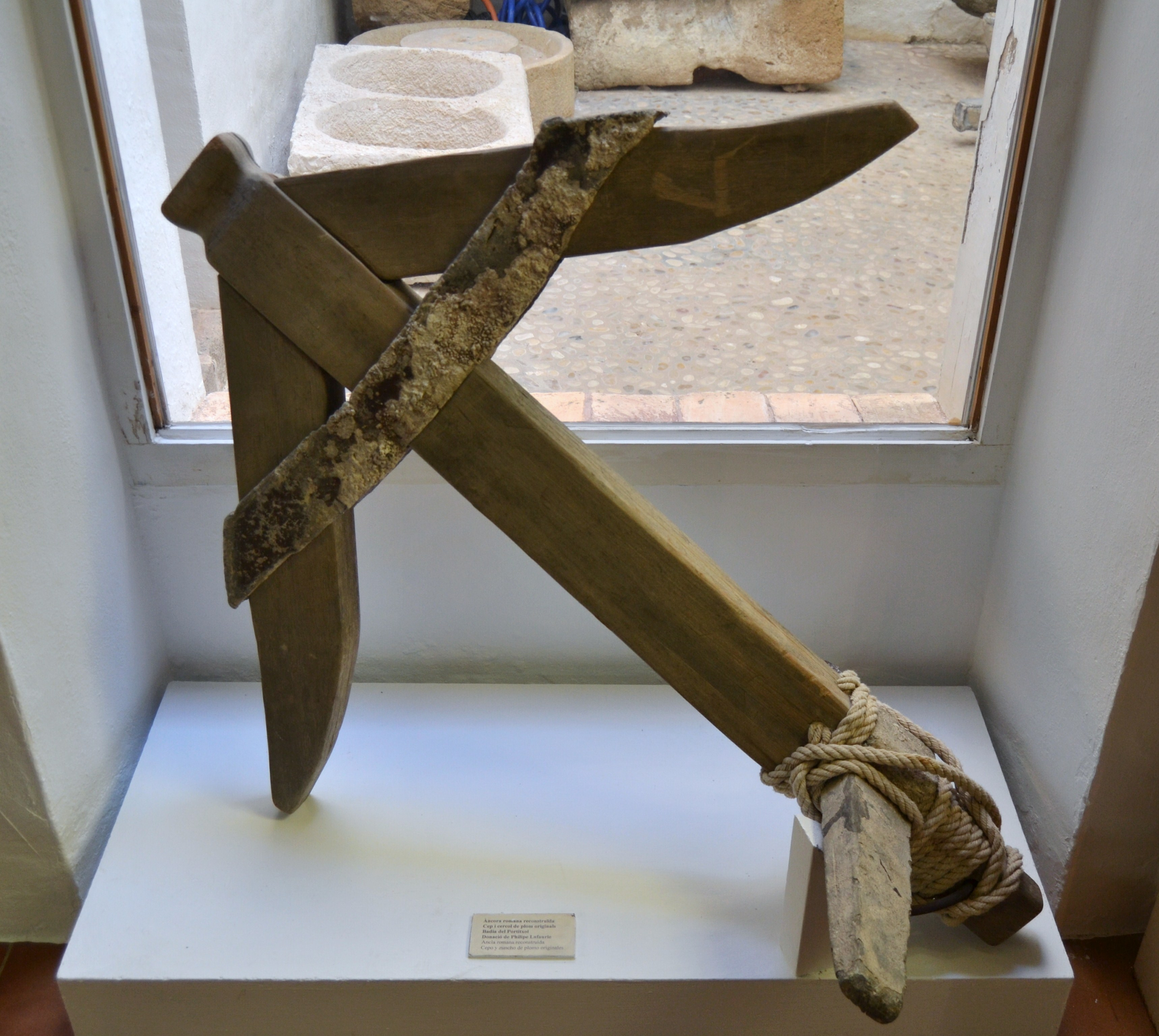 Àncora romana reconstruïda, cep i cèrcol de plom originals, badia del Portitxol, museu Soler Blasco de Xàbia.